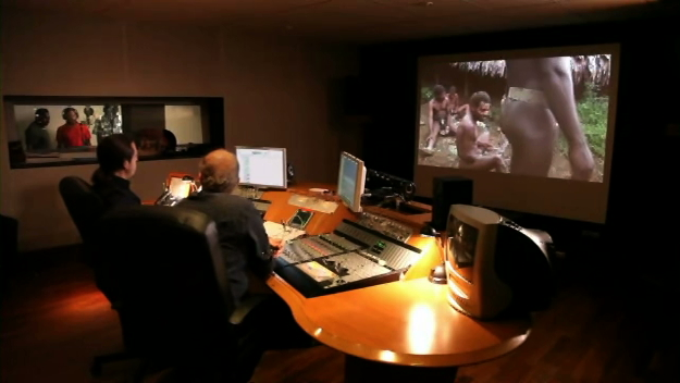 Enregistrement de la musique du documentaire de Patrice Franceschi : les trois Saa et puis la France, par le compositeur et musicien Hervé Postic.